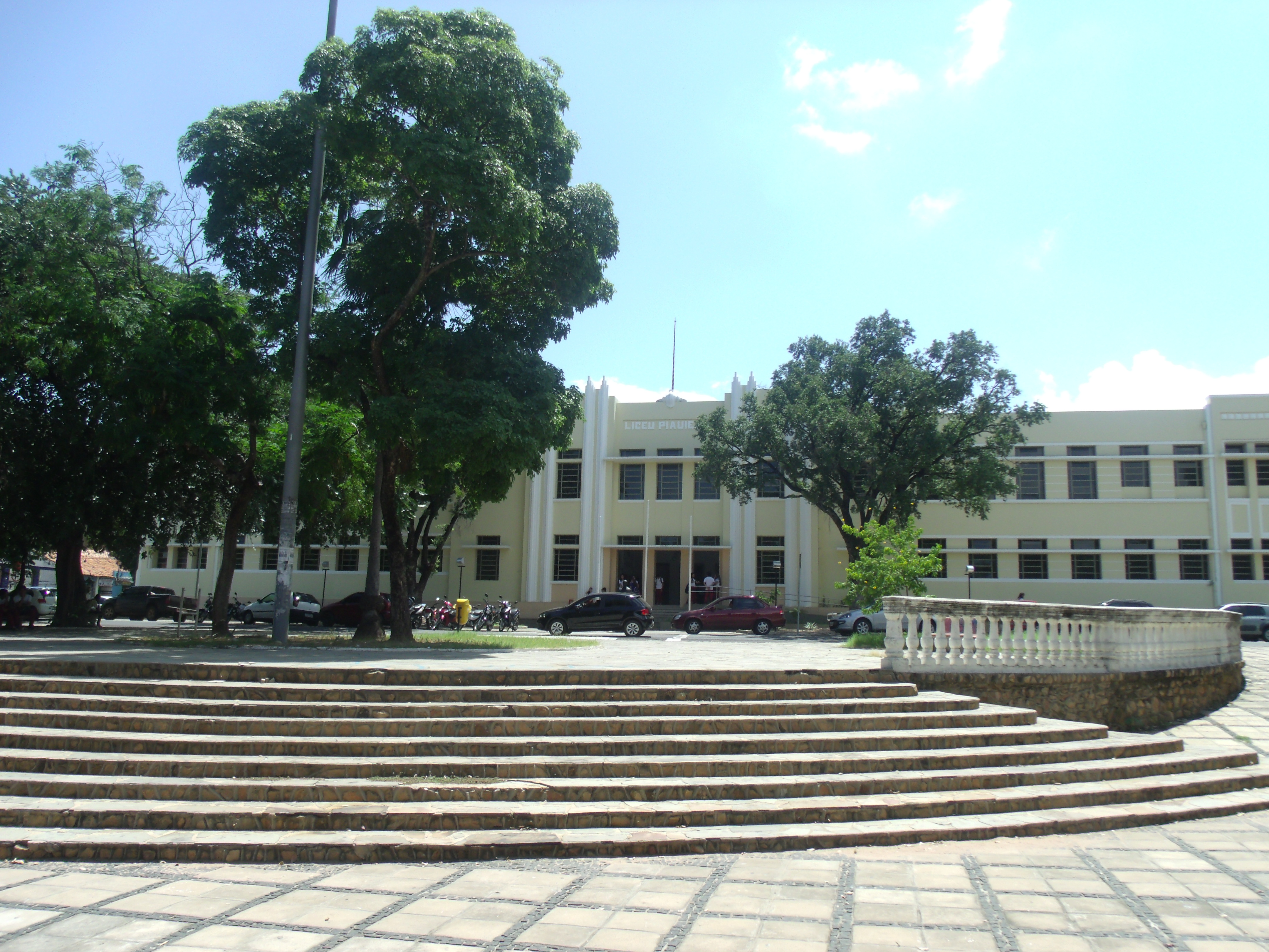 Vista do colégio Liceu Piauiense.